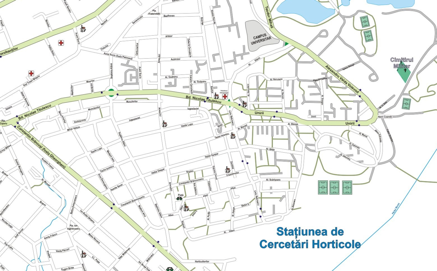 Harta cartierului Gheorgheni, Cluj-Napoca